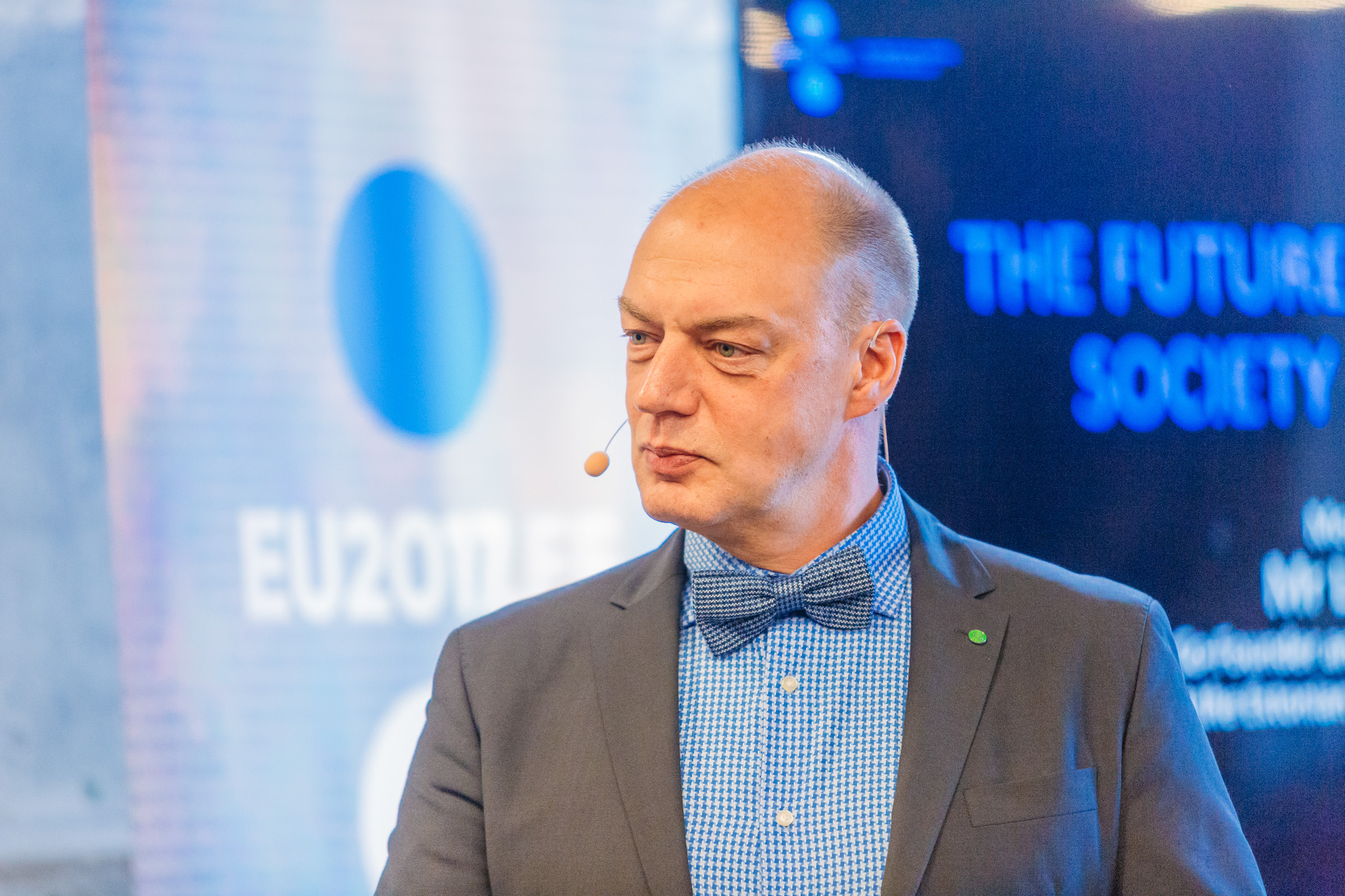 Linnar Viik at the Tallinn Digital Summit, 2017.